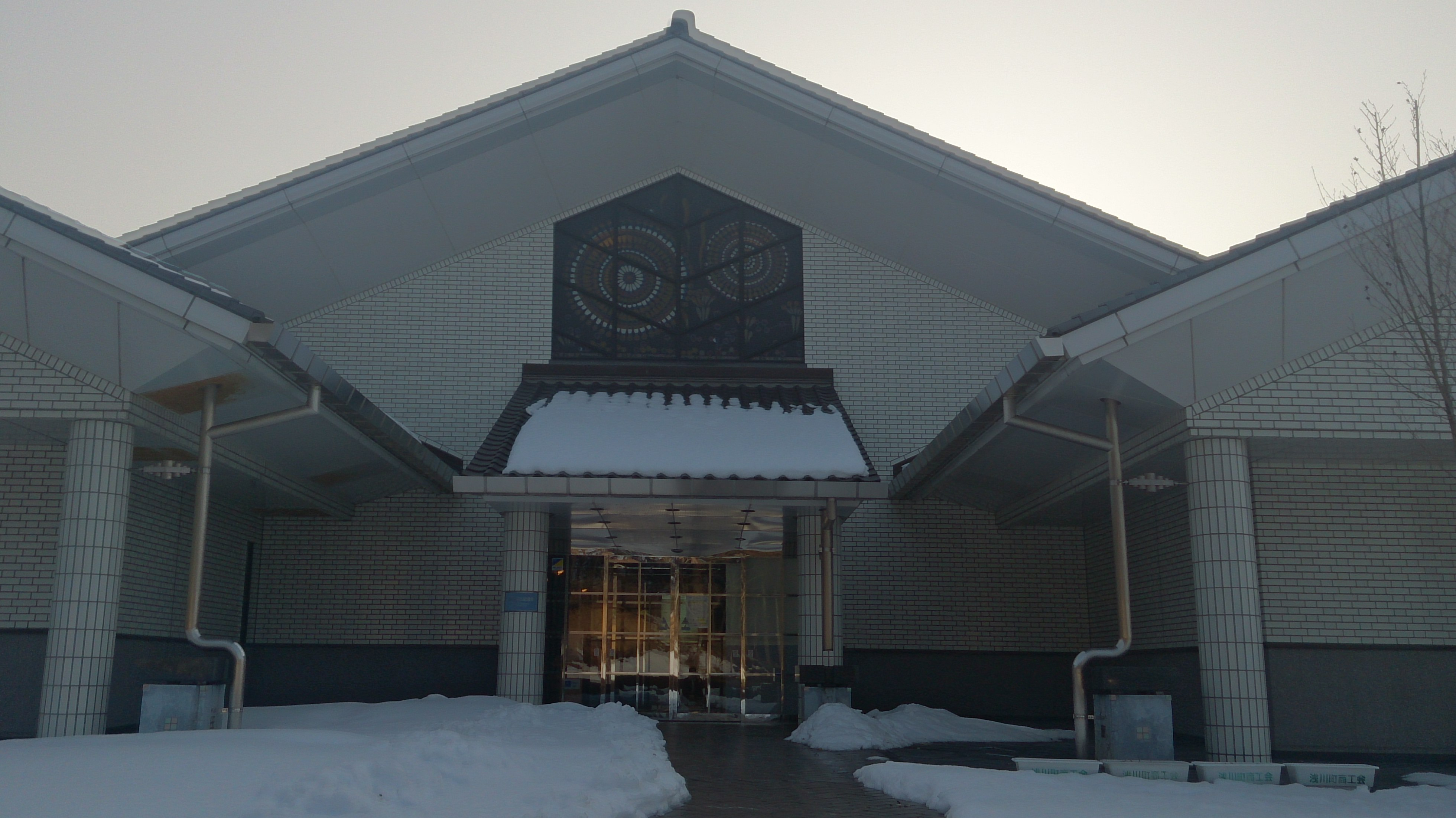 Tomizo Yoshida Memorial Hall in Asakawa, Fukushima